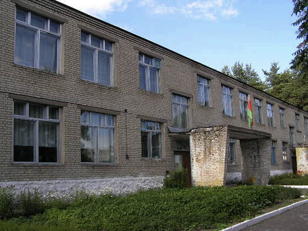 п.Ильич